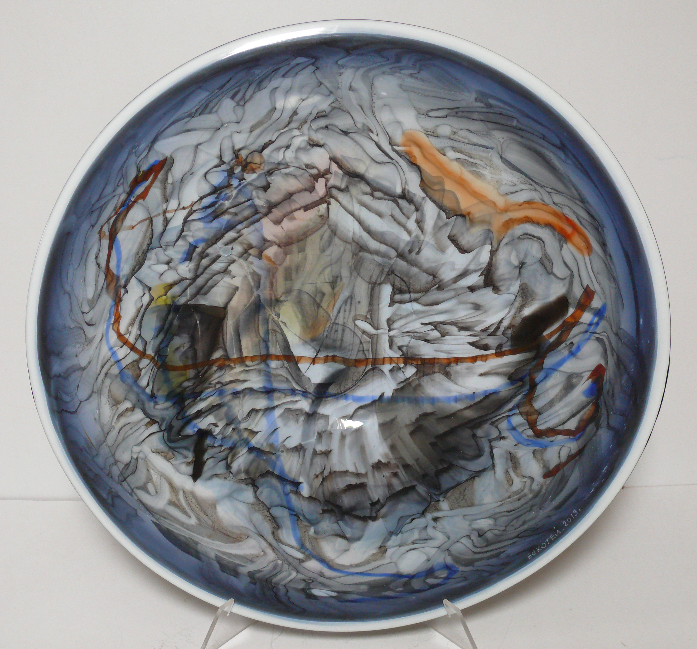 Андрій Бокотей, "Сон". Гутне скло, діаметр 65 см., 2013 р.